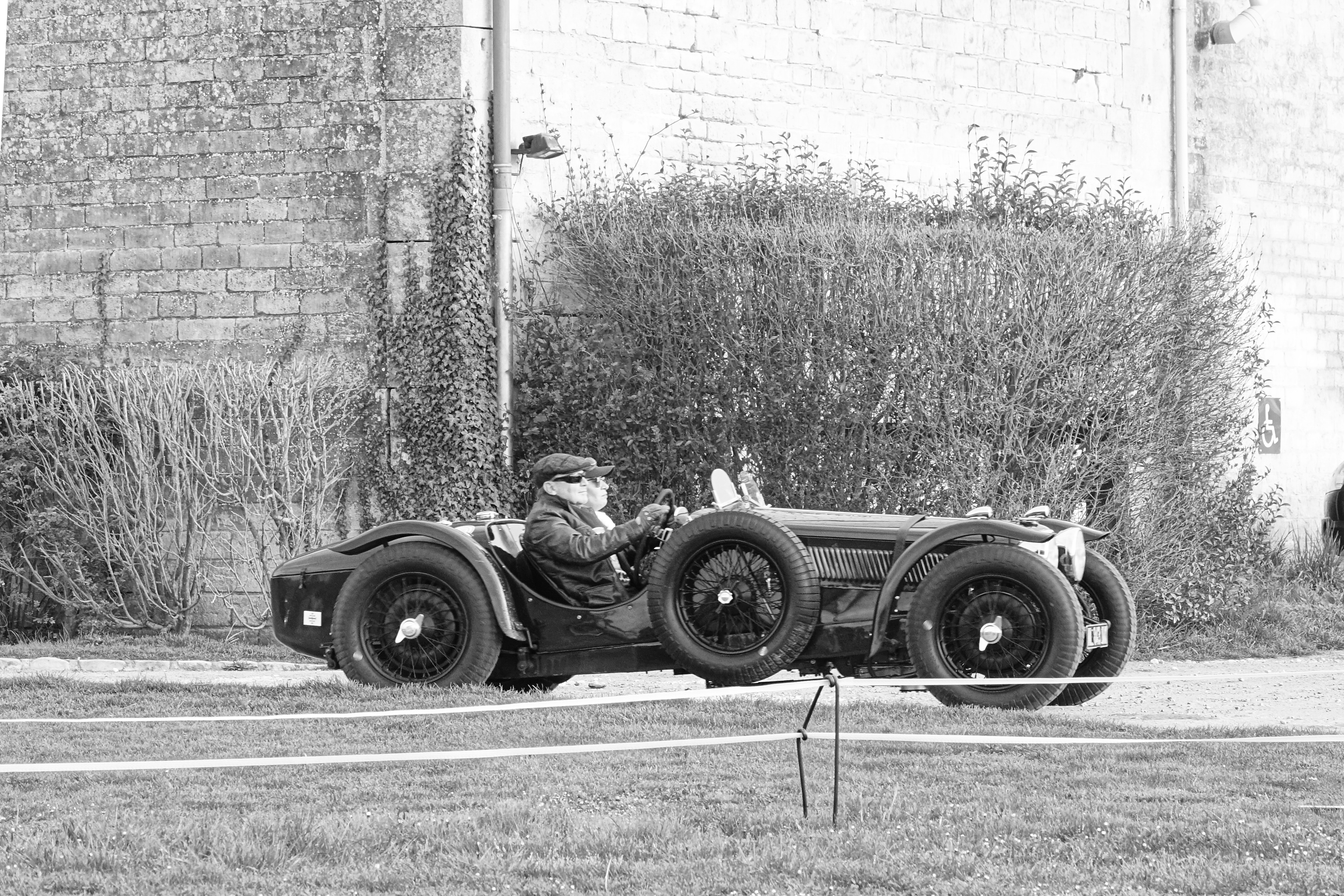 Rallye d'Aumale 2018